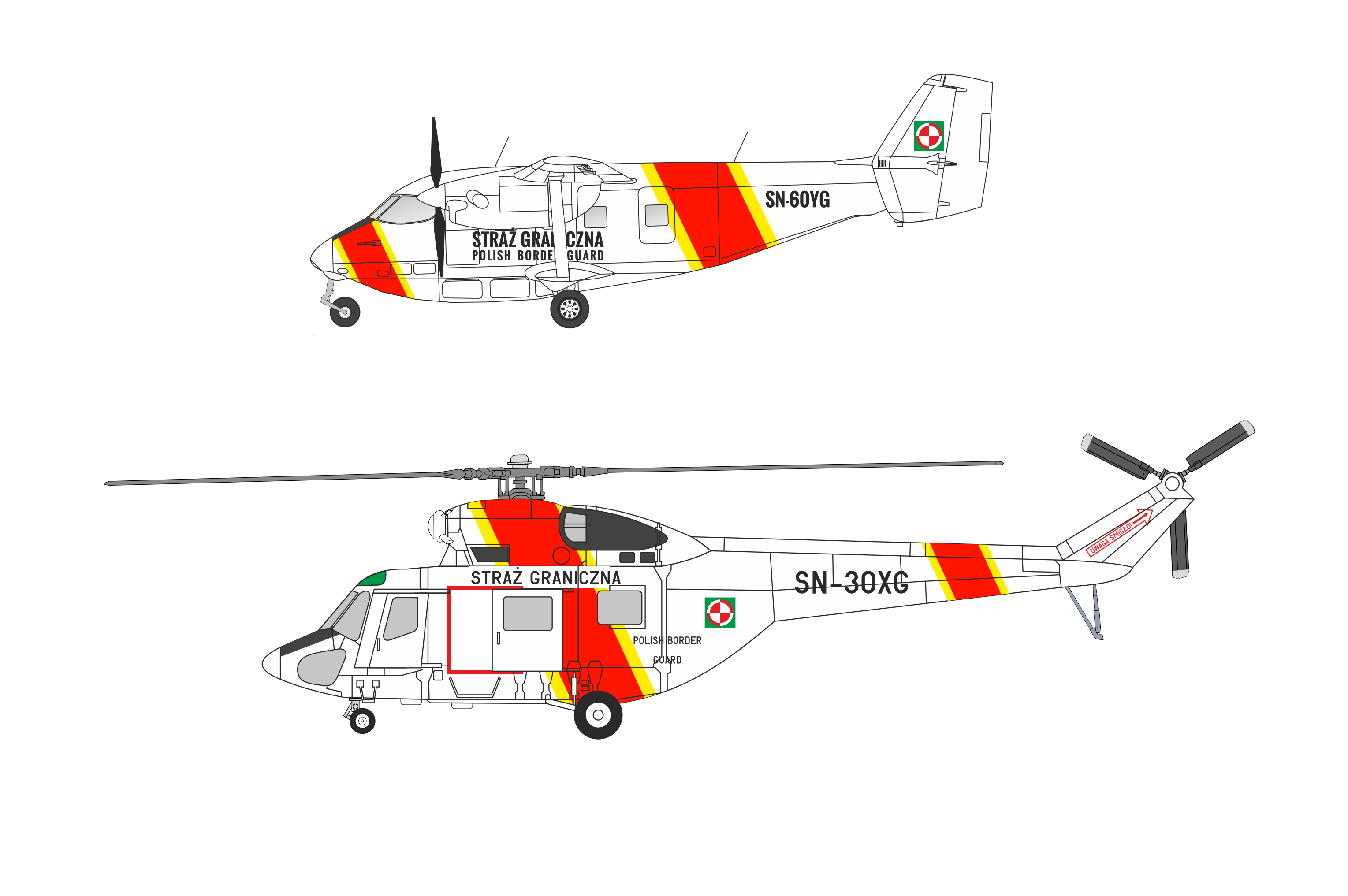 Schemat malowania statków powietrznych Straży Granicznej